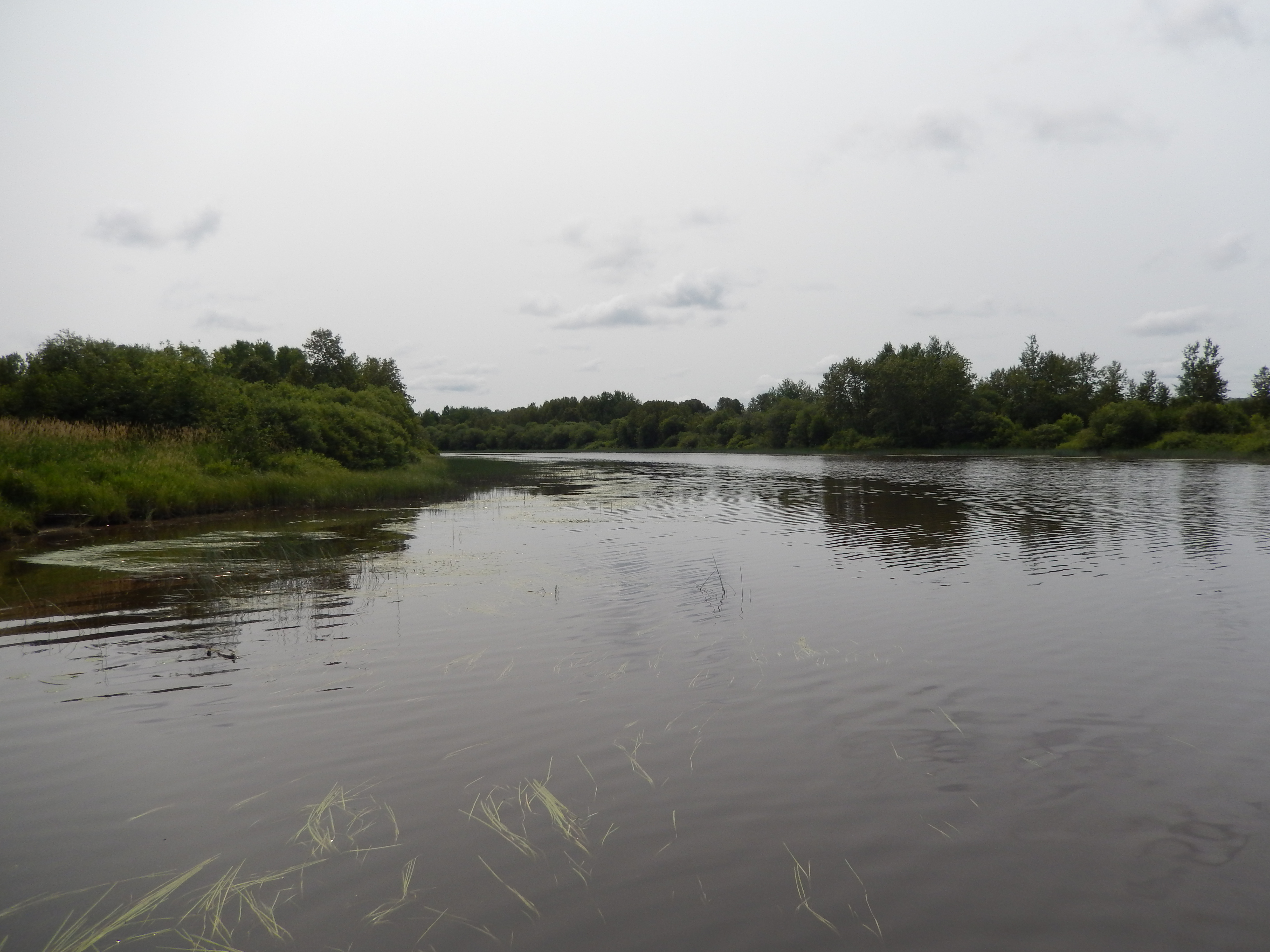 Rivière Turgeon à Val-Paradis vers l'amont